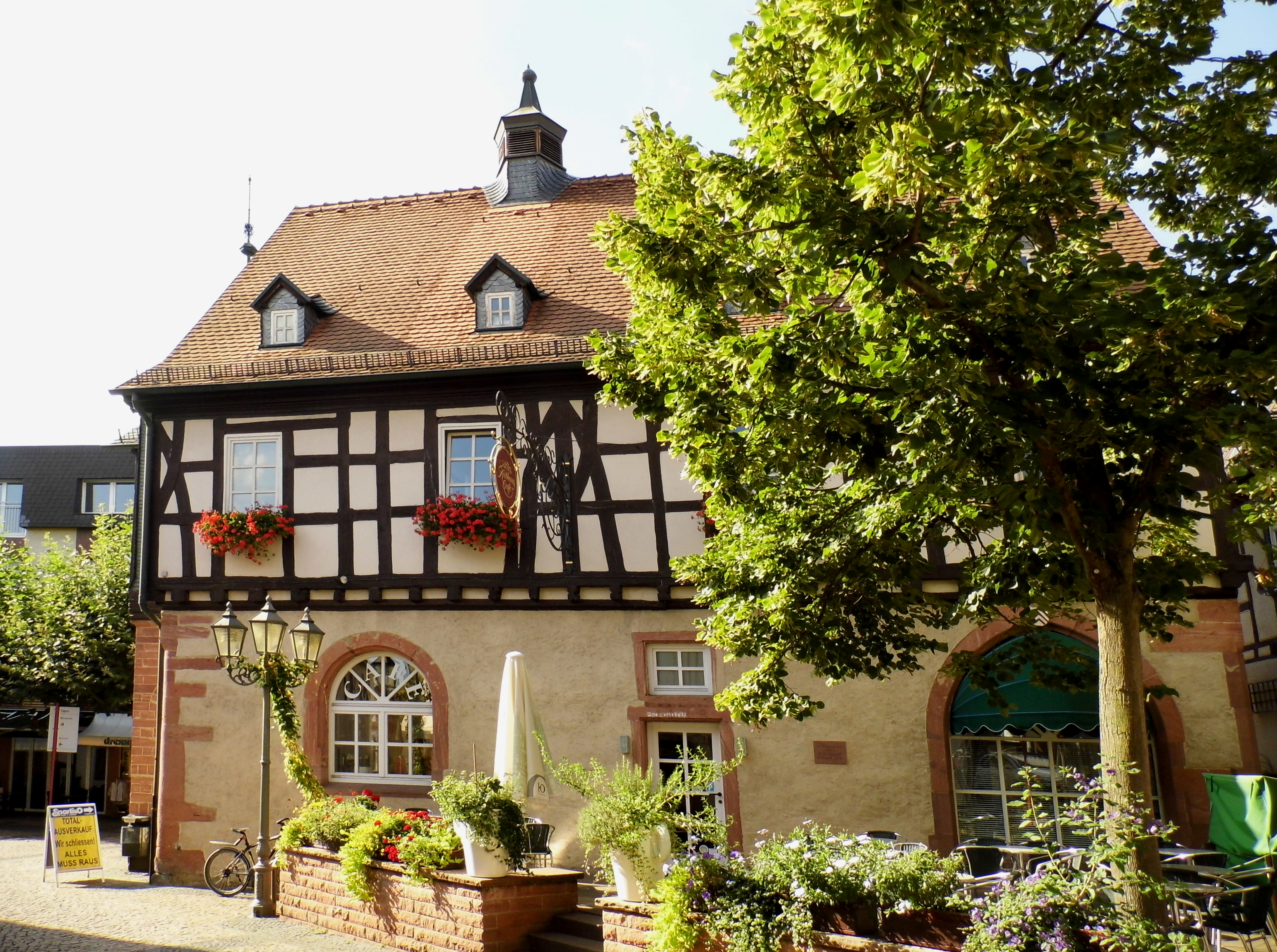 Hofheim, altes Rathaus, Seite